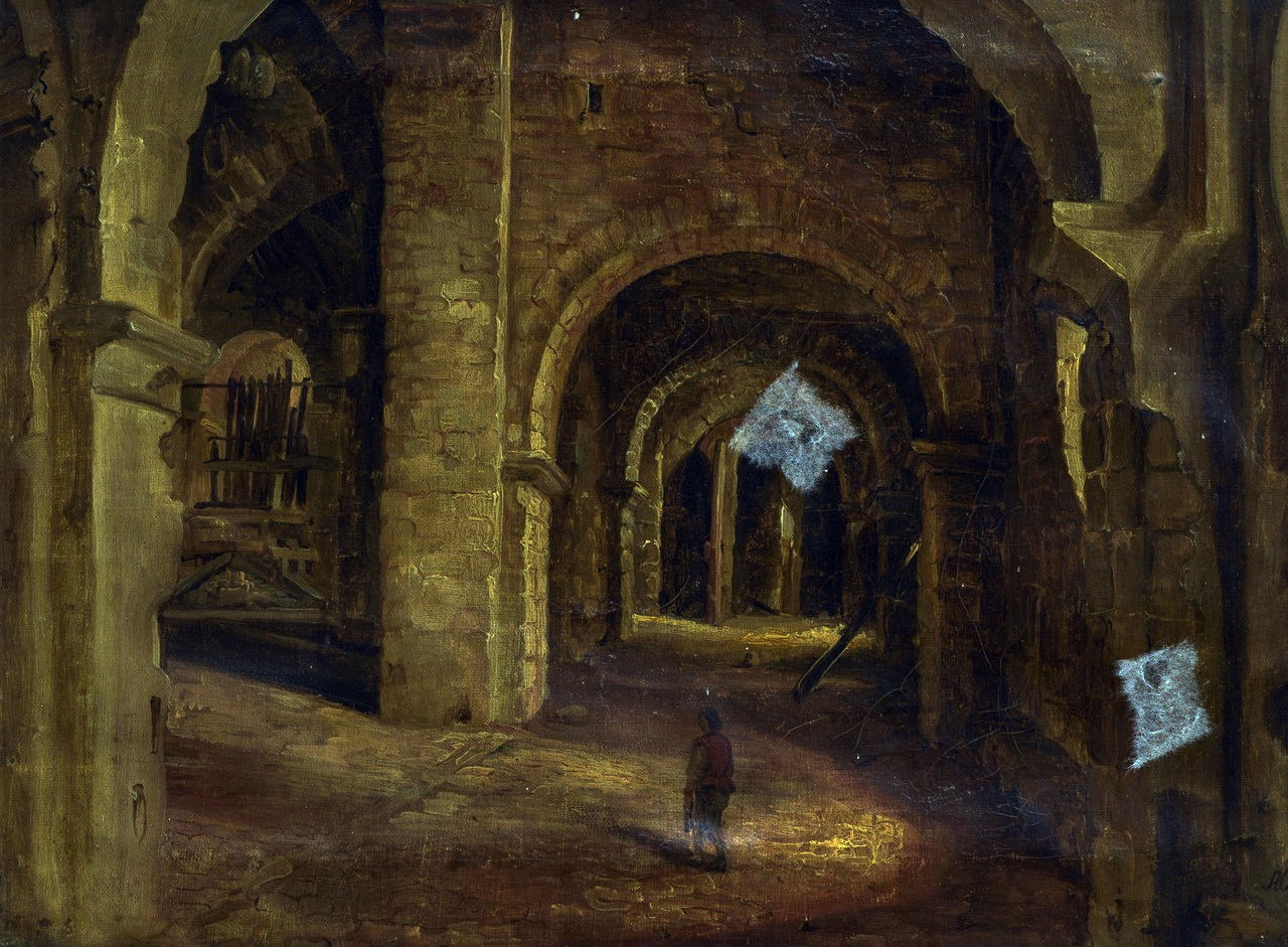 Olieverfschilderij door Alexander Schaepkens van de zogenaamde Keizerzaal in het westwerk van de Sint-Servaaskerk in Maastricht. Afmetingen: 53 x 67 cm (incl. lijst). Collectie Bonnefantenmuseum Maastricht, objectnummer 1000966b.